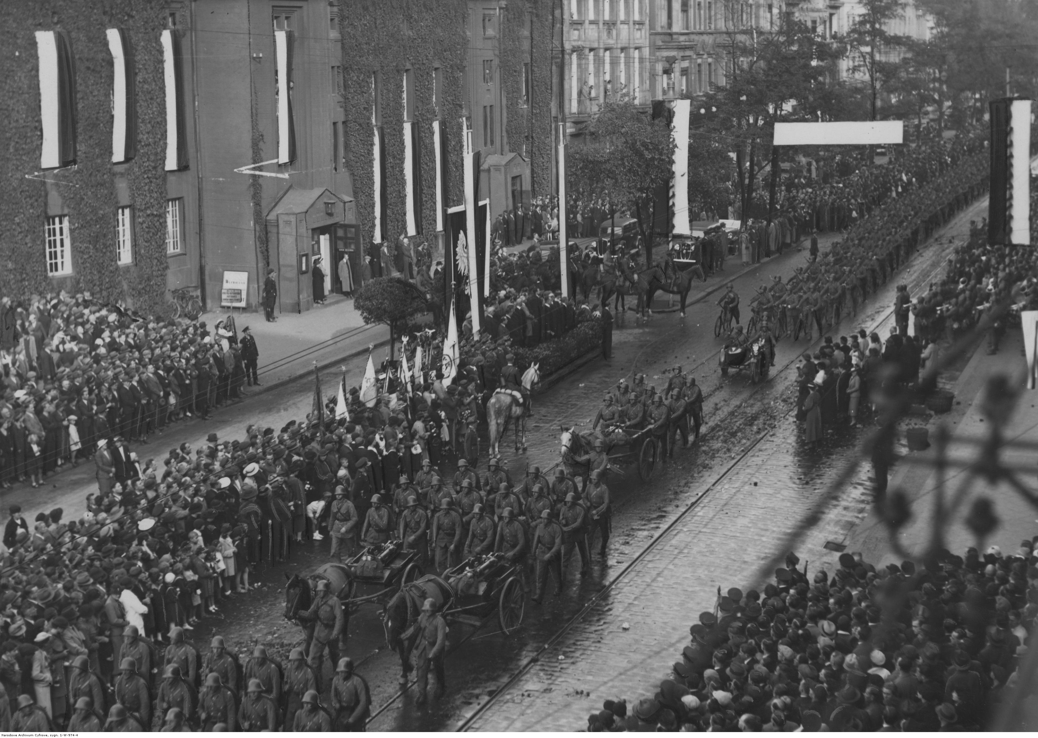 Powitanie w Katowicach 23 Górnośląskiej Dywizji Piechoty powracającej z manewrów. Defilada na ulicy marszałka Józefa Piłsudskiego. Koncern Ilustrowany Kurier Codzienny - Archiwum Ilustracji. Sygnatura: 1-W-974-4